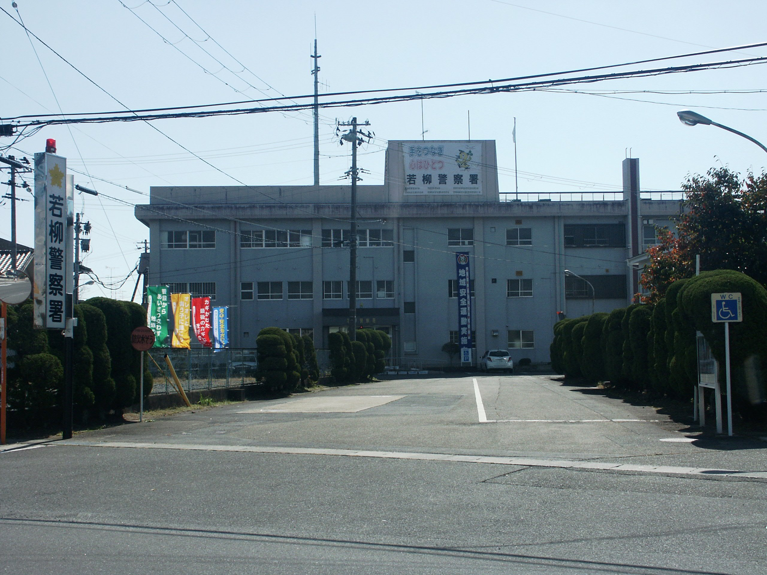 宮城県若柳警察署庁舎